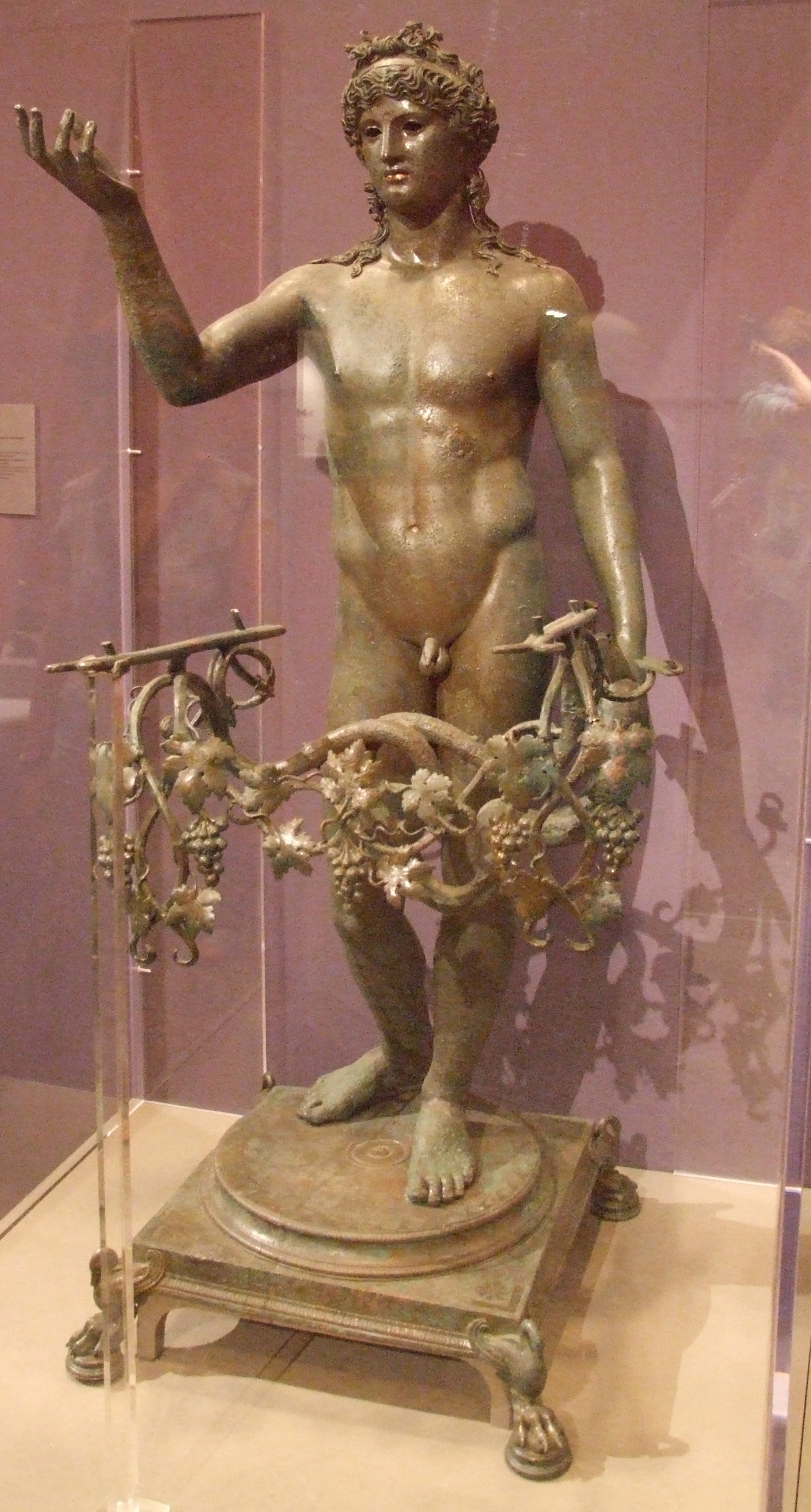 Efebo lampadoforo quale Bacco, statuetta in bronzo rinvenuta a Pompei nella Casa di Marcus Fabius Rufus (regio VII, 16, Insula Occidentalis 22), inv. SAP 13112. Bronzestatue des Bacchus aus Pompeiji, dort verschüttet 79 n.Chr.; Die Statue diente in der Villa des Marcus Fabius Rufus als Lampenhalter bei nächtlichen Gastmählern. Geschaffen wurde sie etwa 1 Jahrhundert vorher im eklektisch-klassizistischen Stil zur Zeit des Augustus; Pompeji-Ausstellung 2007, Europäischer Kulturpark Bliesbruck-Reinheim